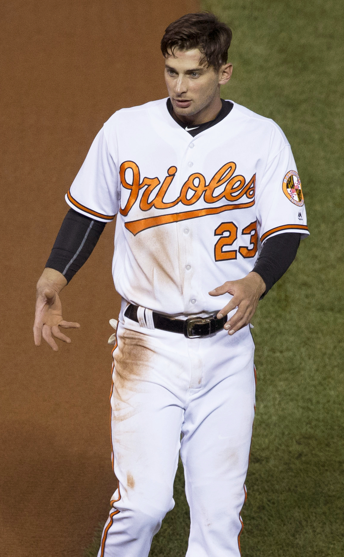 Joey Rickard